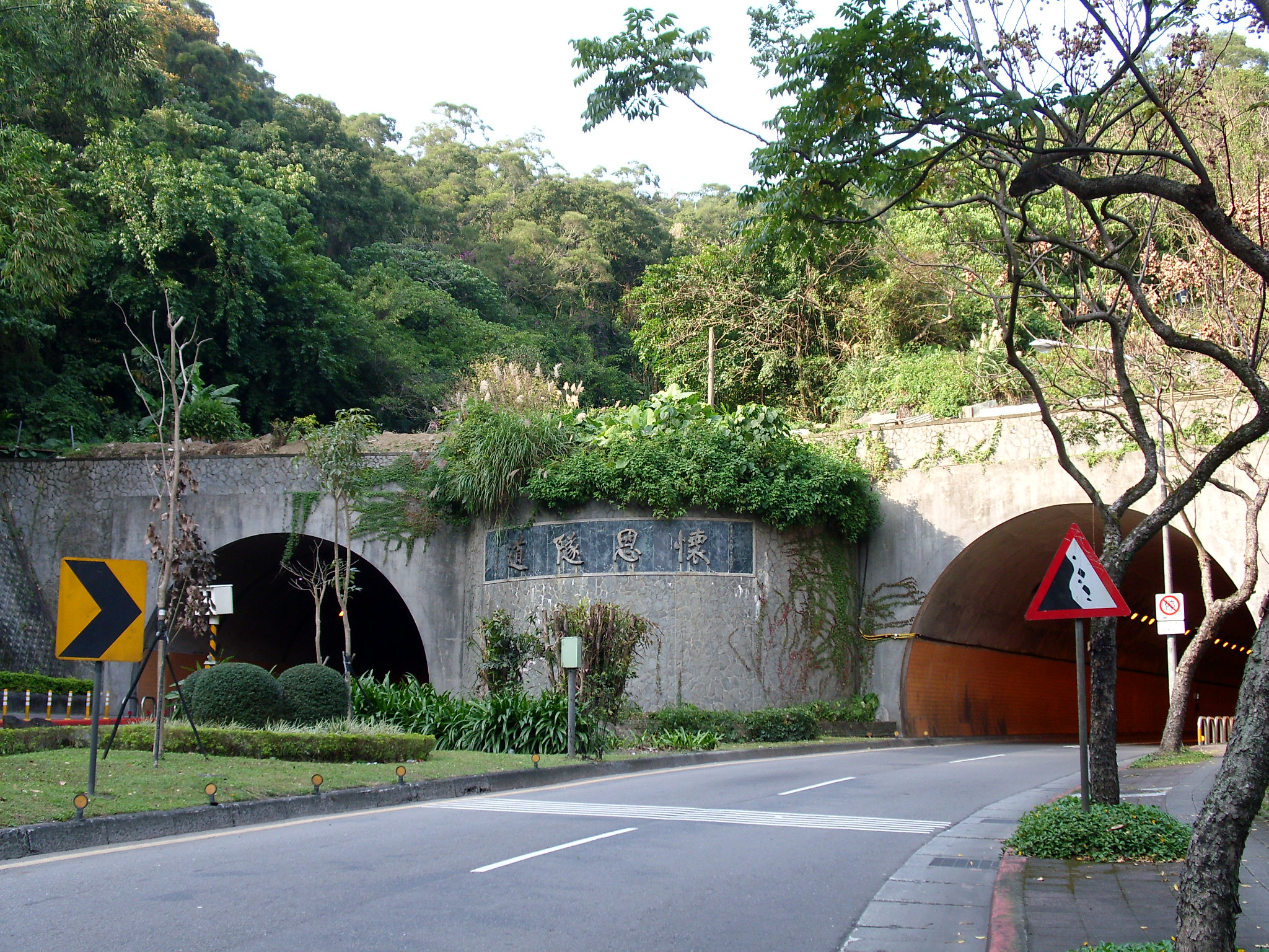 Bân-lâm-gú: 懷恩隧道南爿的出入口